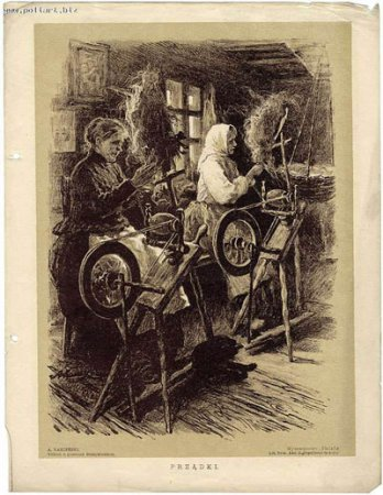 Попрадкі, накід з Белавежскай пушчы, 1912 (мал. Антонія Каменьскага).